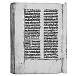 Het begin van "Van Seven manieren van heileger minnen" (Beatrijs van Nazareth) Den Haag, Koninklijke Bibliotheek: handschrift. 70 E 5, f. 190v